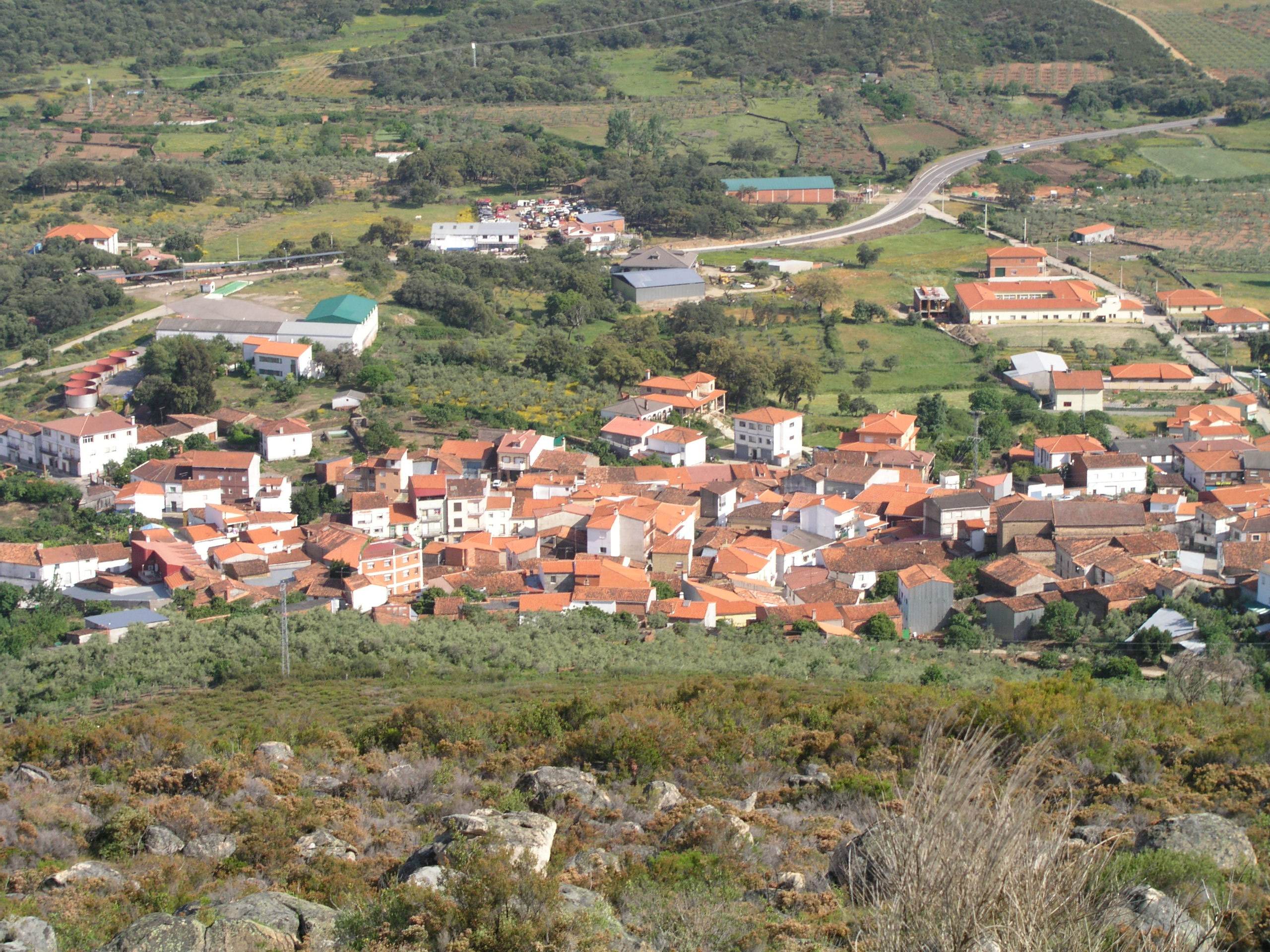 Torrecilla de los Ángeles (Cáceres, España) desde la ermita de Los Santitos.